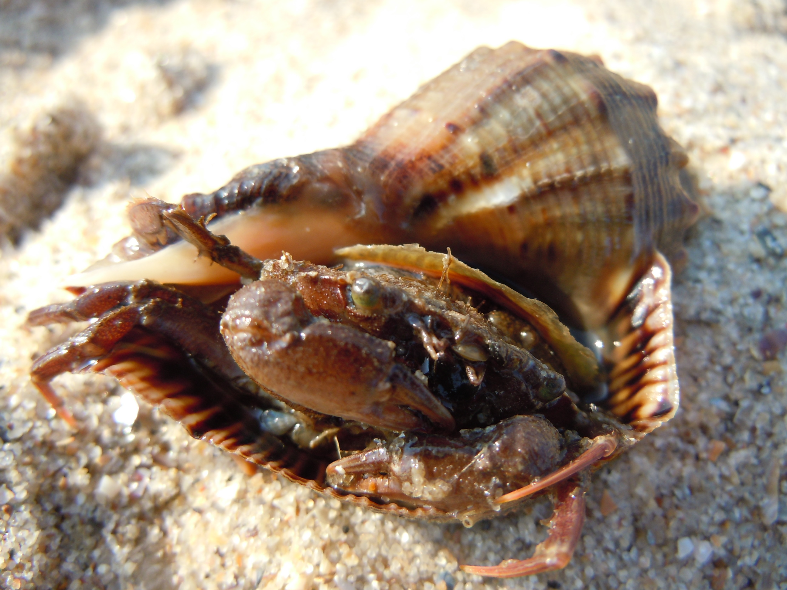 Рапана (Rapana venosa) їсть краба Carcinus aestuarii